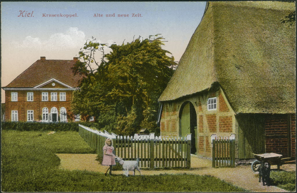 Im Vordergrund rechts die Hardersche Räucherkate und im Hintergrund der Kieler Kaufmann.